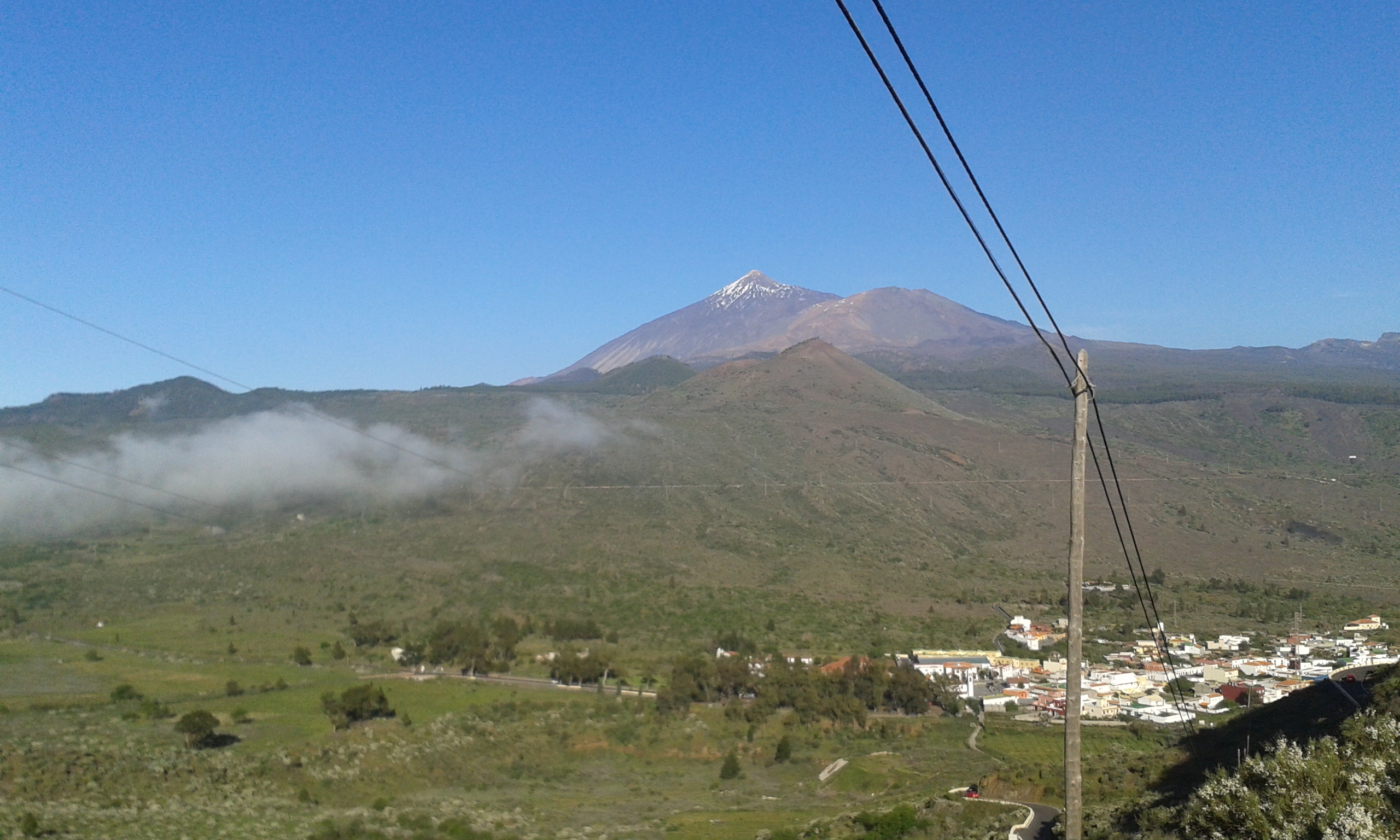 Vista del Teide y de Santiago de Teide desde la TF-436 desde la parada de La Cumbre Natura2000 entry, EEA entry